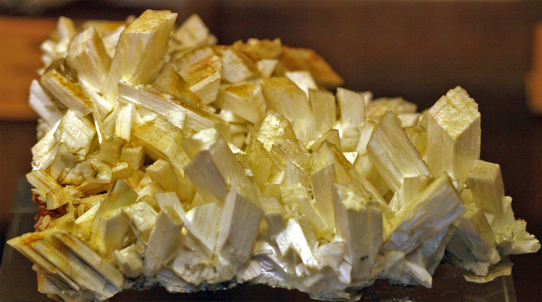 Sujet:Laumontit aus dem Museo Geominero de Madrid Source:ex-Commons; Foto vum User:Alberto Salguero